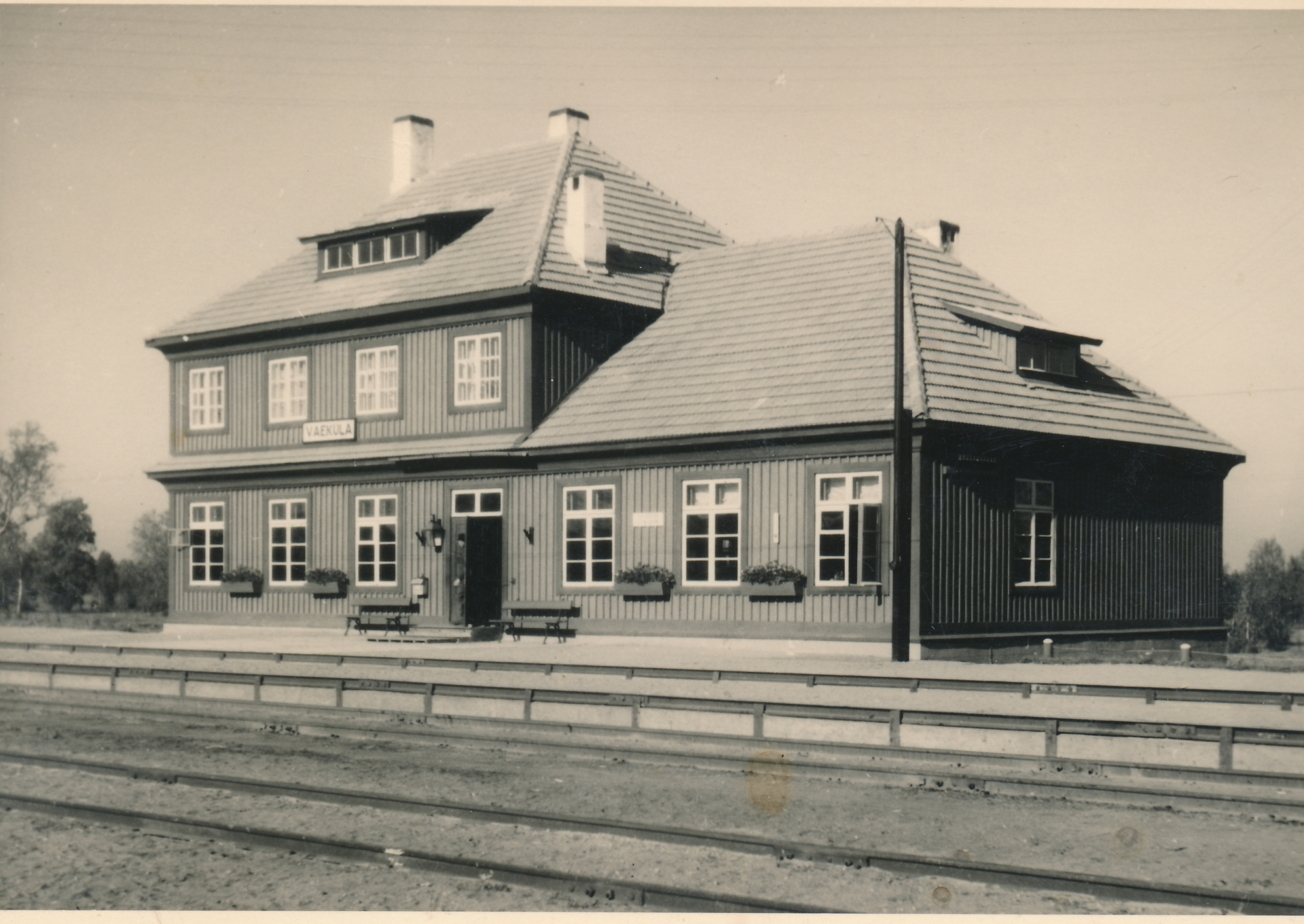 Vaeküla jaamahoone